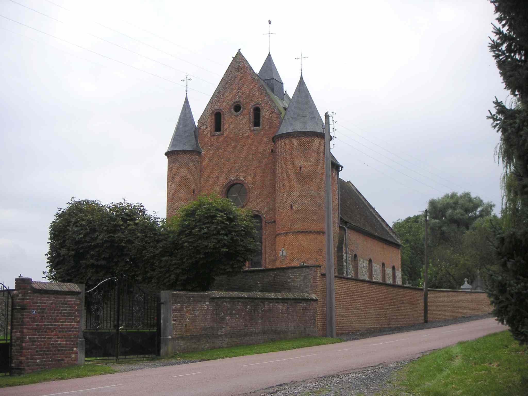 Église fortifiée de Malzy (Aisne, France). Photo prise par moi le 01 septembre 2005